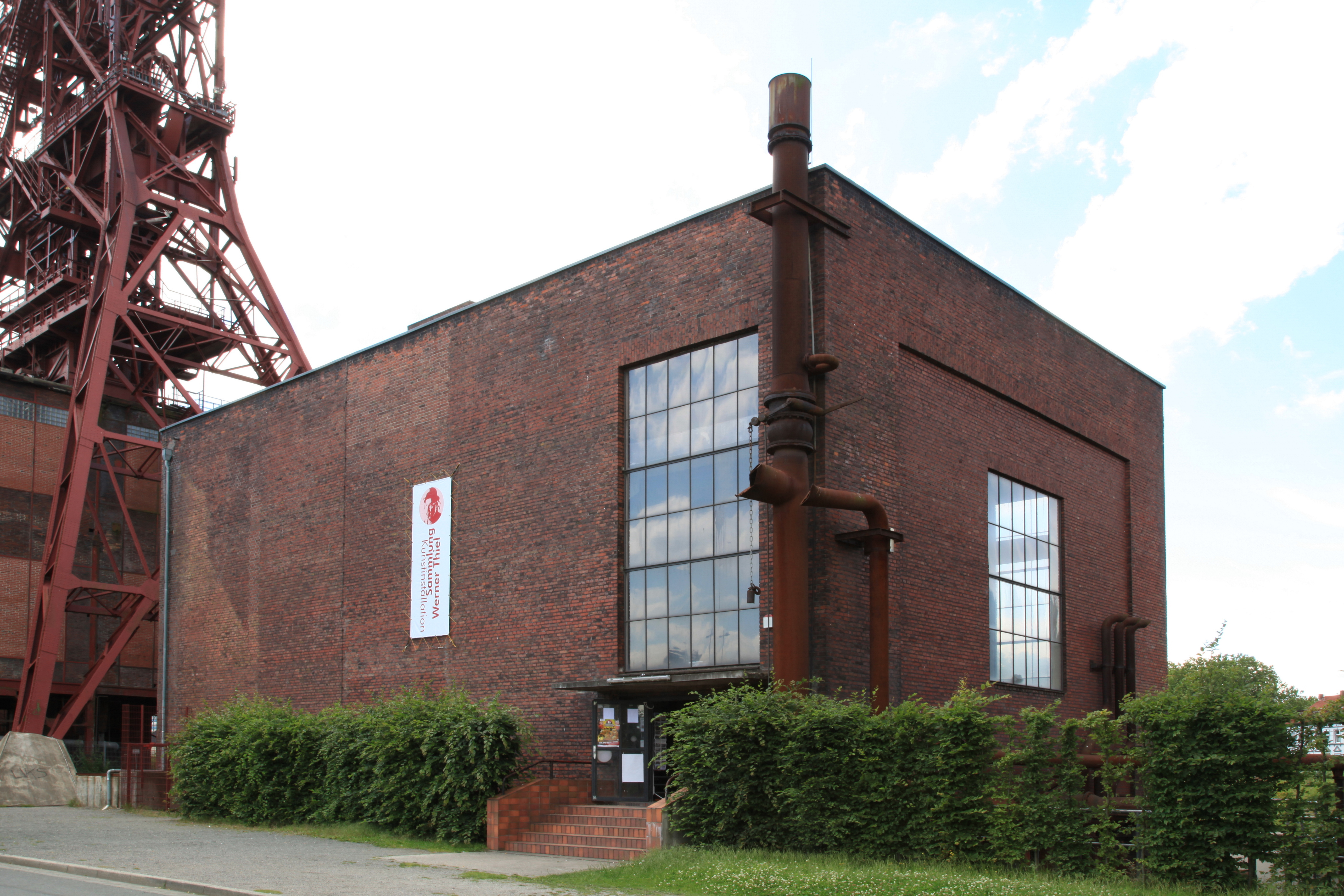 Museum: Nördliches Maschinenhaus von Zeche Consolidation Schacht 9 in Gelsenkirchen